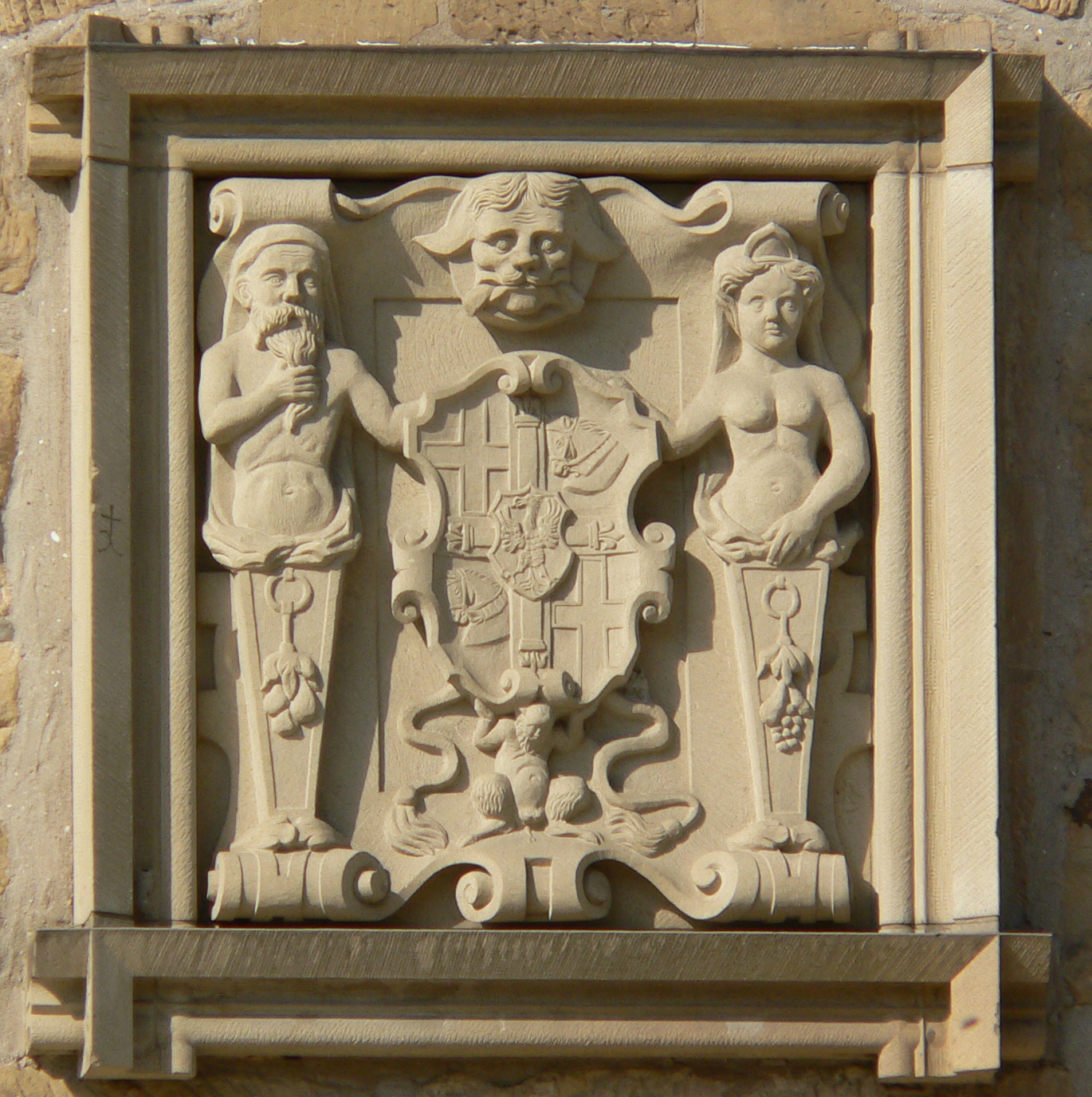 Coat of yrms of "Deutschmeister" Georg Hund von Wenkheim, relief in Neckarsulm